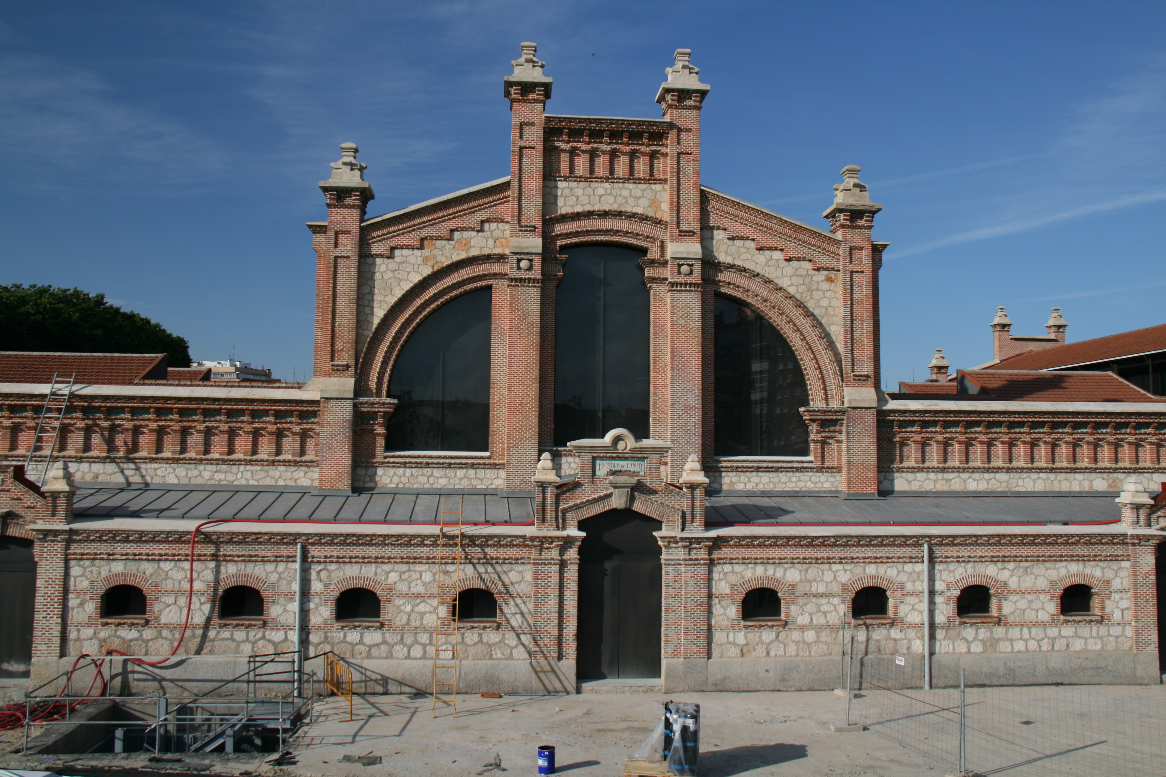 Las naves de estabulación, exposición y venta (Lanar)